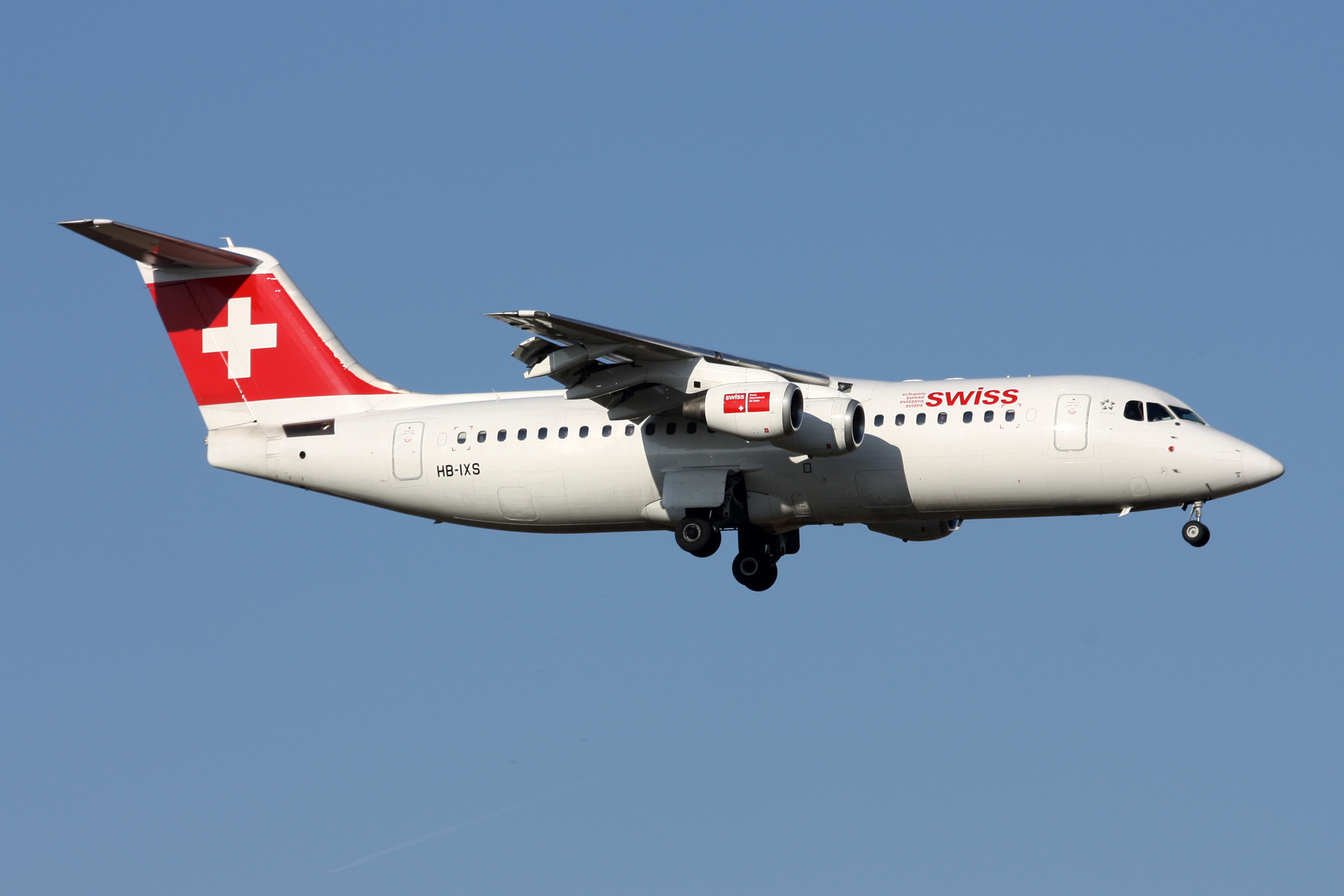 Zürich (- Kloten) (ZRH / LSZH) Switzerland 3.2012